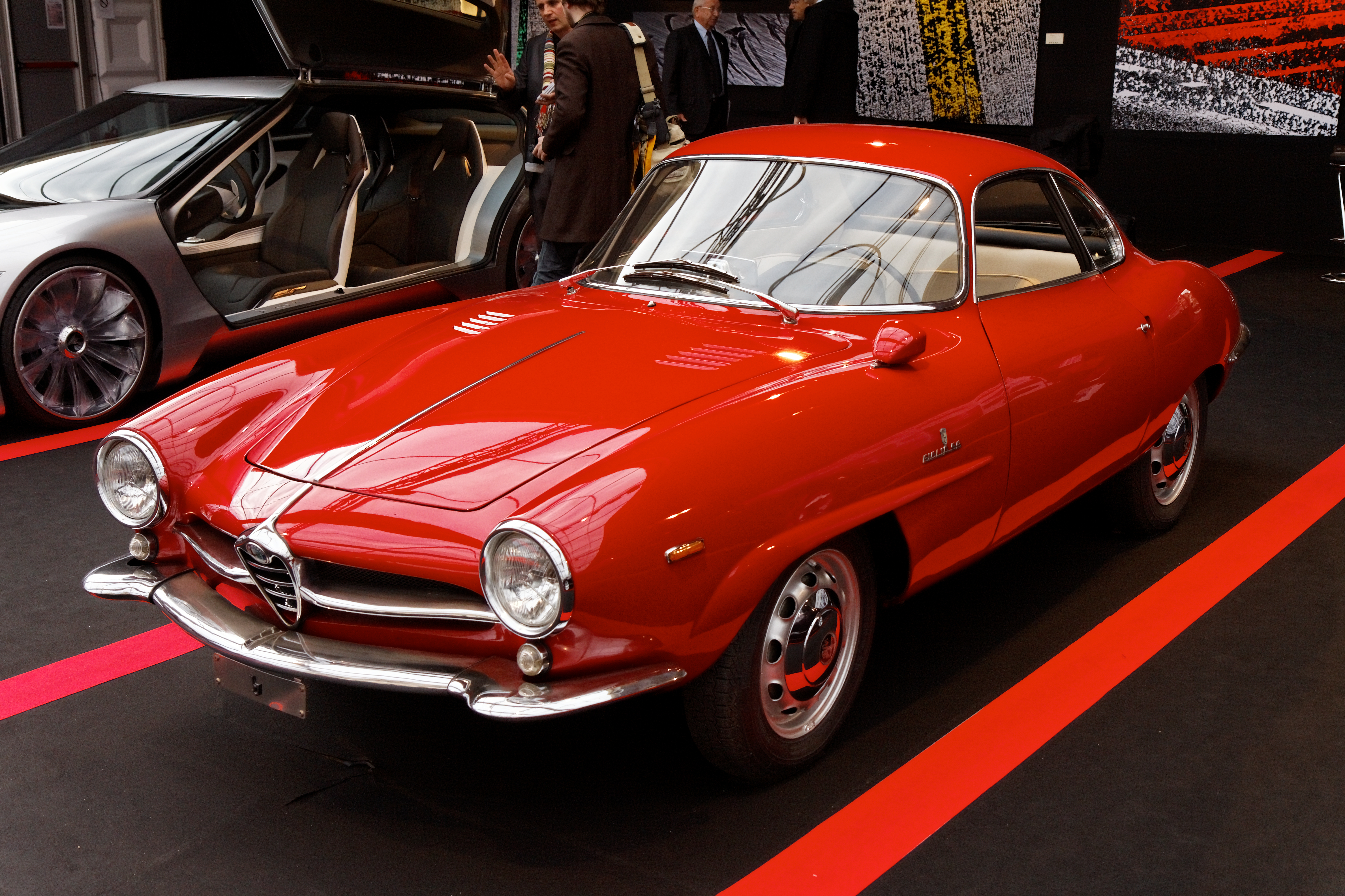 Alfa Romeo Giulia SS